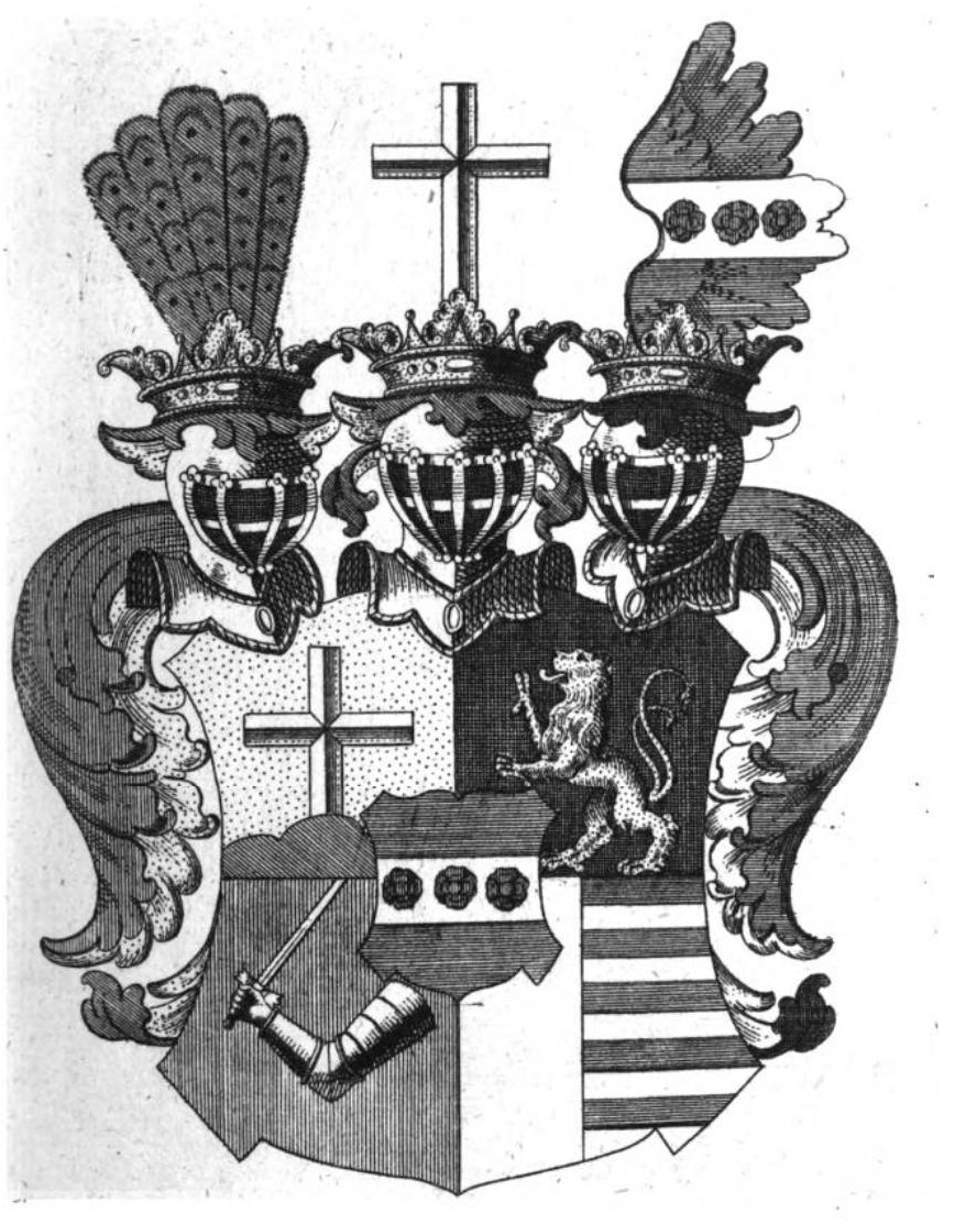 Herb rodziny Dyhrn